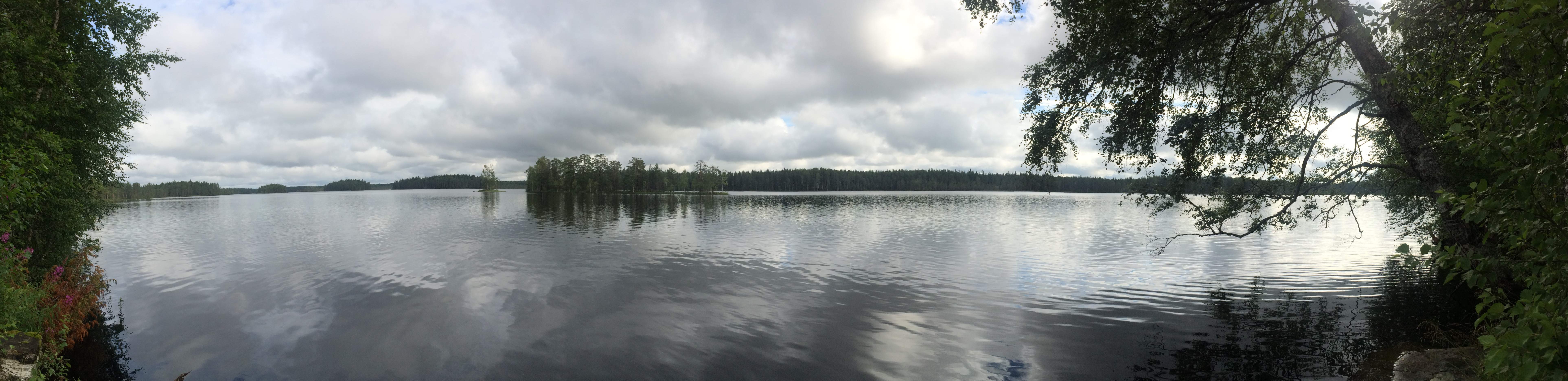 Суованъярви